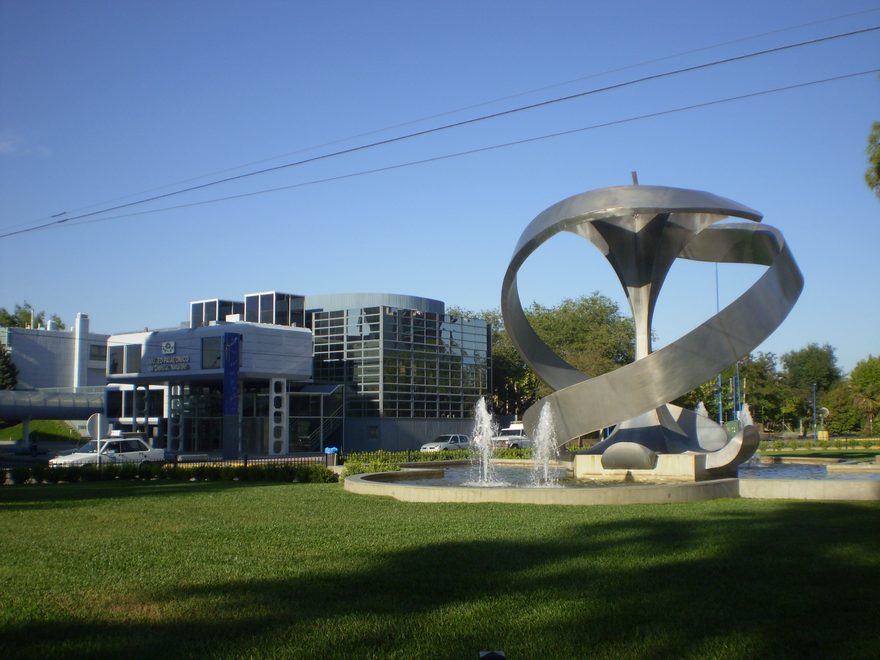 Monumento a La Producciòn del Alto Valle, Representado por La Manzana y al fondo edificio del Museo Patagónico de Ciencias Naturales de la ciudad de General Roca, Rio Negro, Argentina.